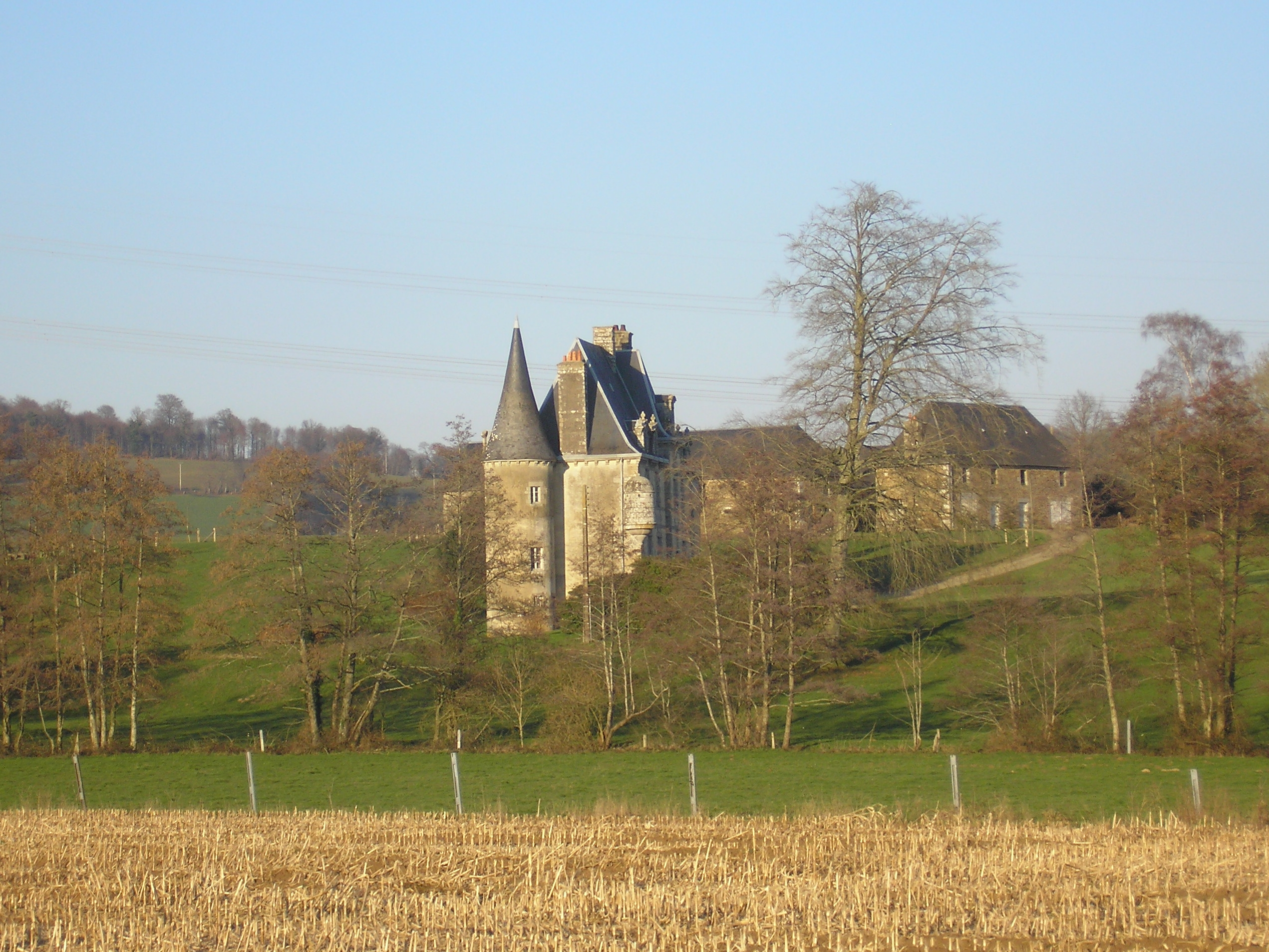 La Bazoge (Normandie, France). Le Logis.